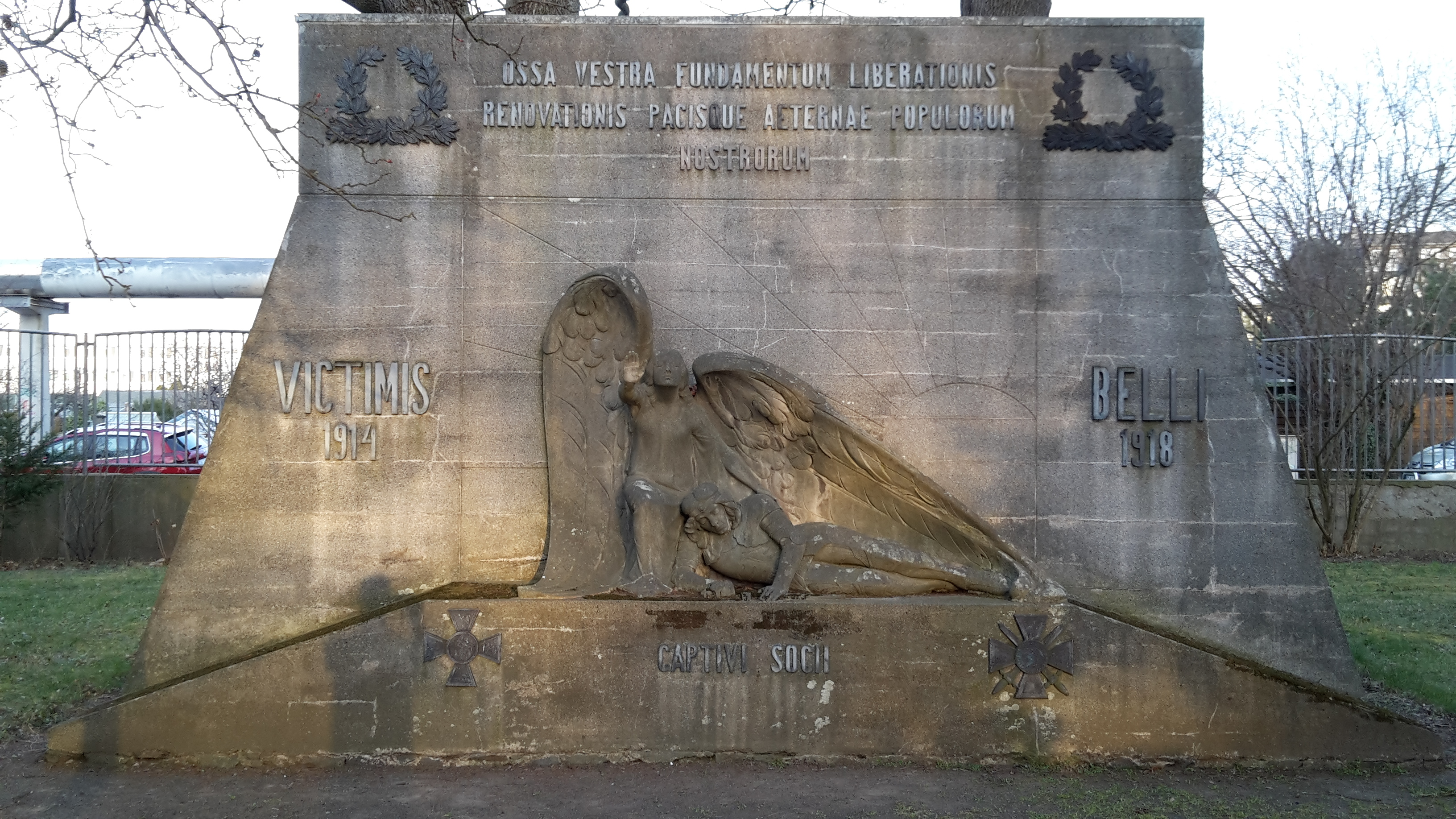 Pomnik zmarłych jeńców wojennych w Budziszynie (Denkmal für verstorbene Kriegsgefangene in Bautzen)